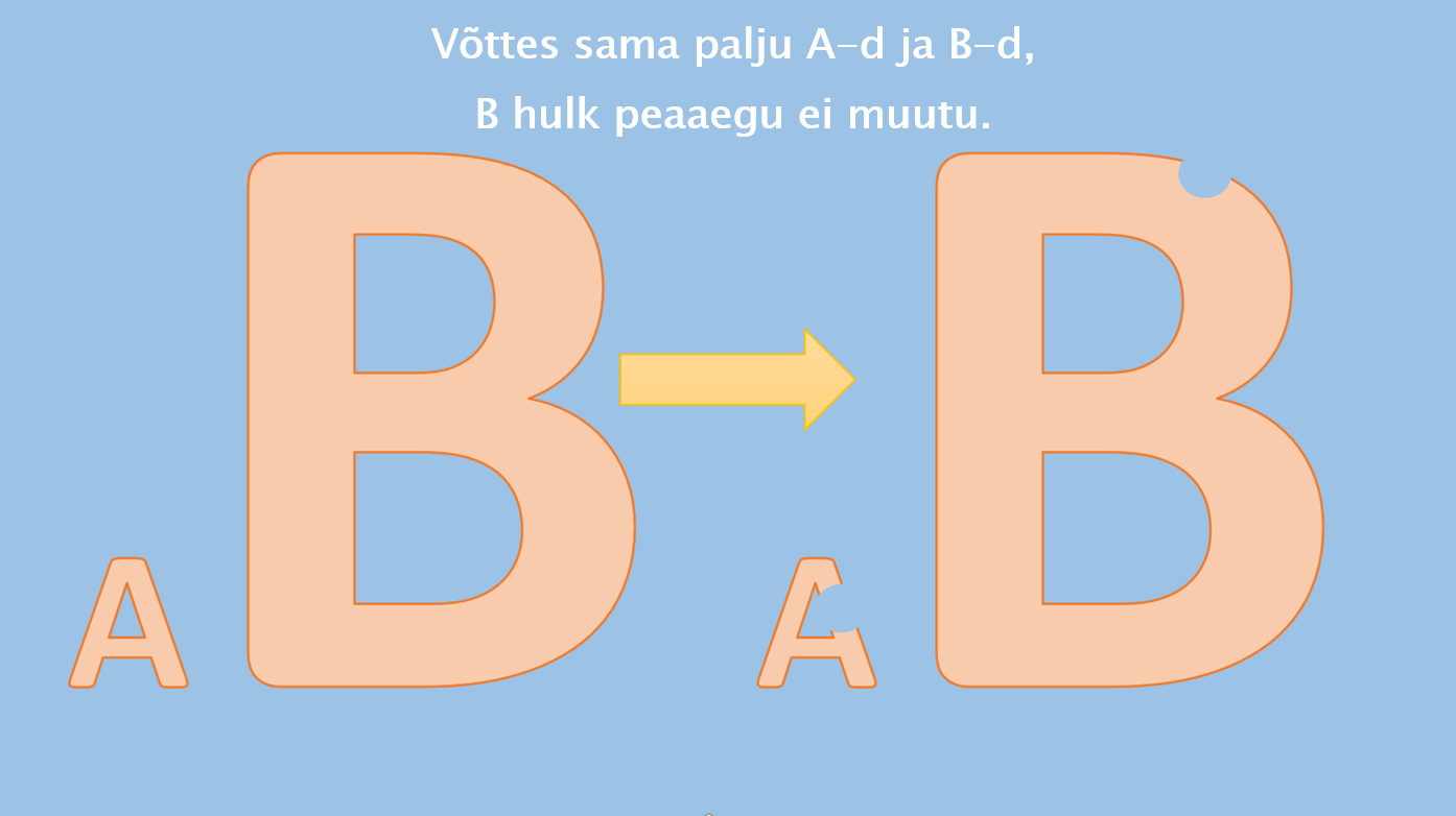 Väga suures liias oleva aine kontsentratsioon praktiliselt ei muutu eemaldades teda sama palju, kui väikest ainet.